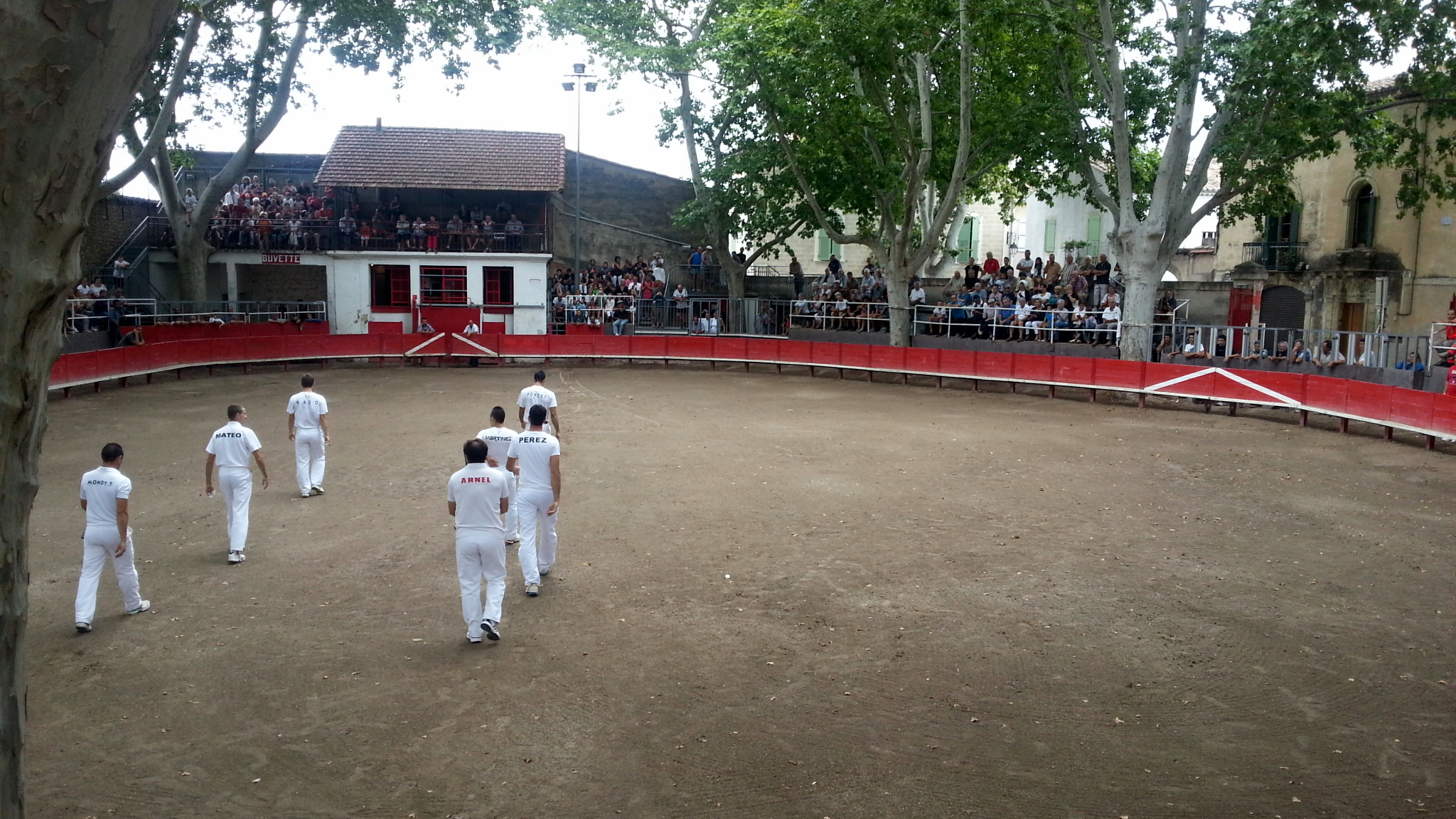 Capelado des raseteurs Mondy, Mateo, Rado, Perez, Martinez et Poncet lors de la fête votive du Cailar le 7 août 2013.